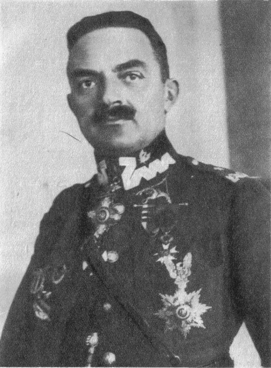 gen. Włodzimierz Ostoja-Zagórski (1882-?)